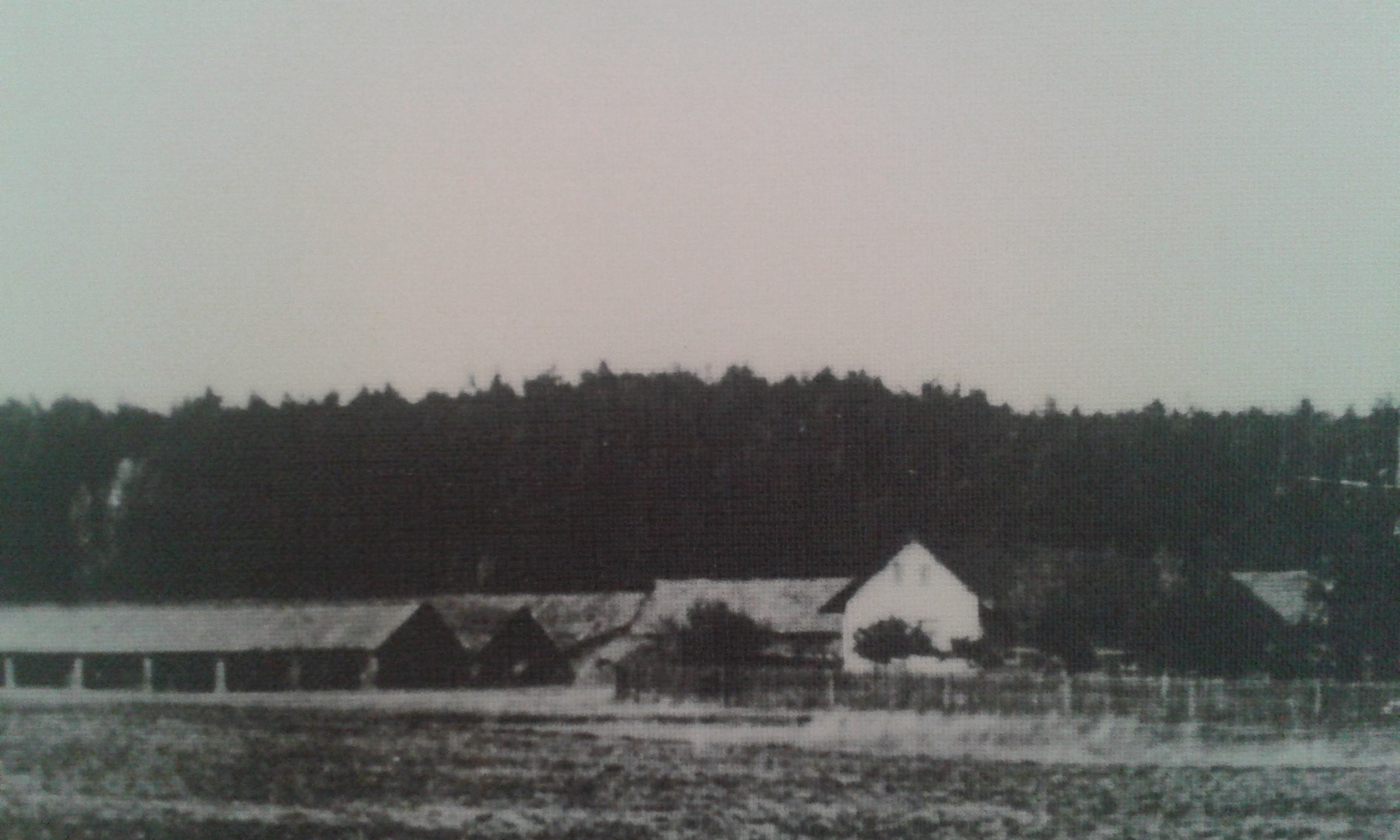 Rokytenská cihelna